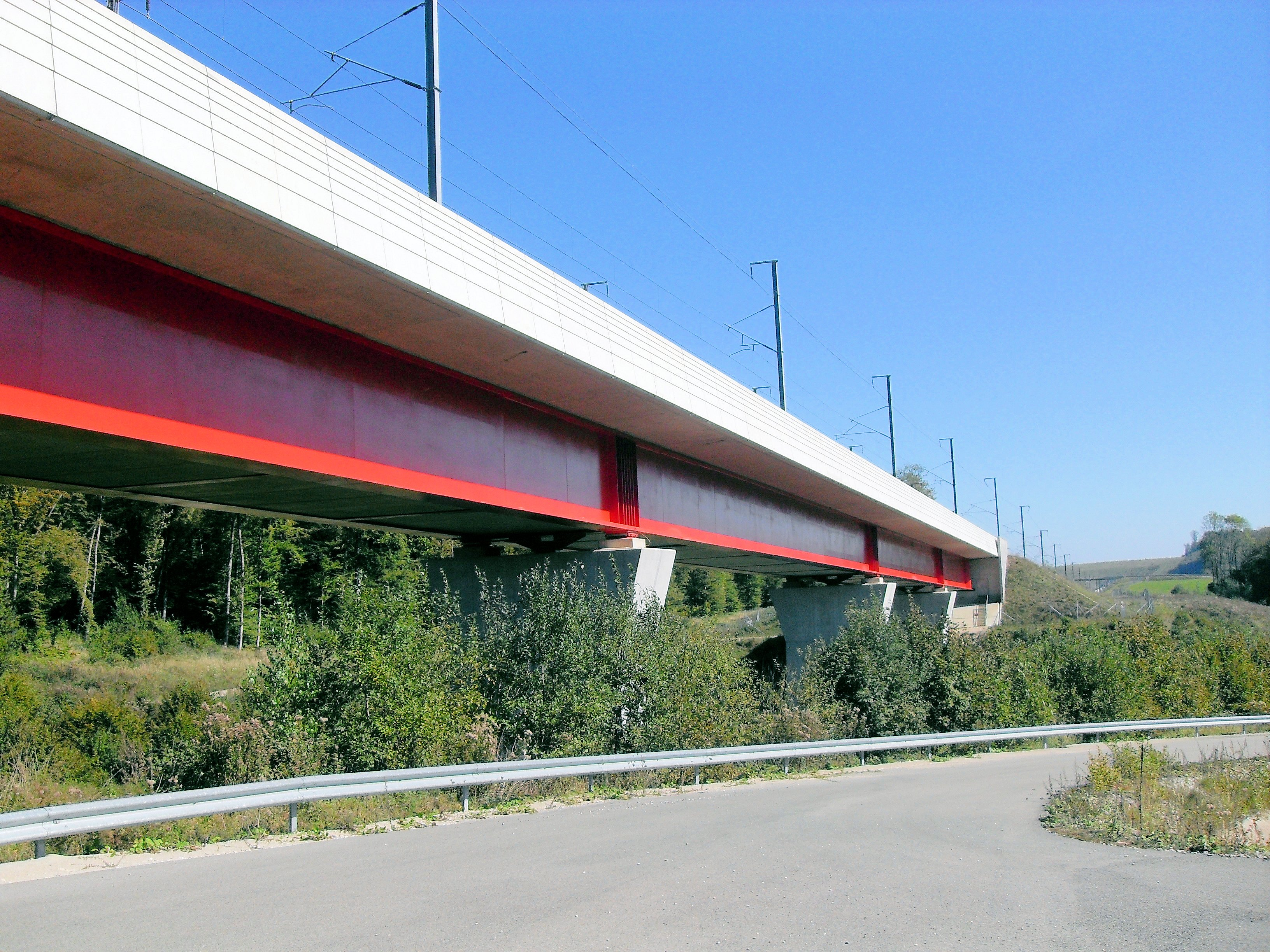 Le viaduc du Pertuis par la LGV Rhin-Rhône au nord-ouest de Montbéliard sur le Rupt dans la commune d'Aibre